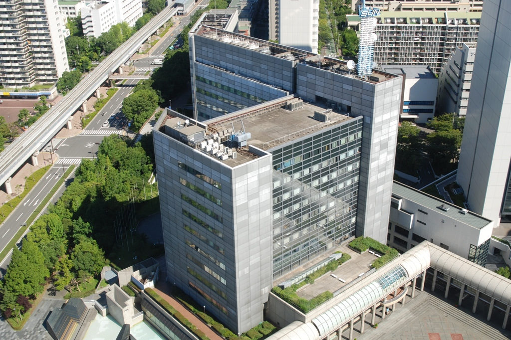 サンテレビジョンの演奏所が入居する神戸国際交流会館ビル。2007年8月11日、投稿者が神戸ポートピアホテルより撮影。 Category:中央区 (神戸市)の画像 Category:建築物の画像